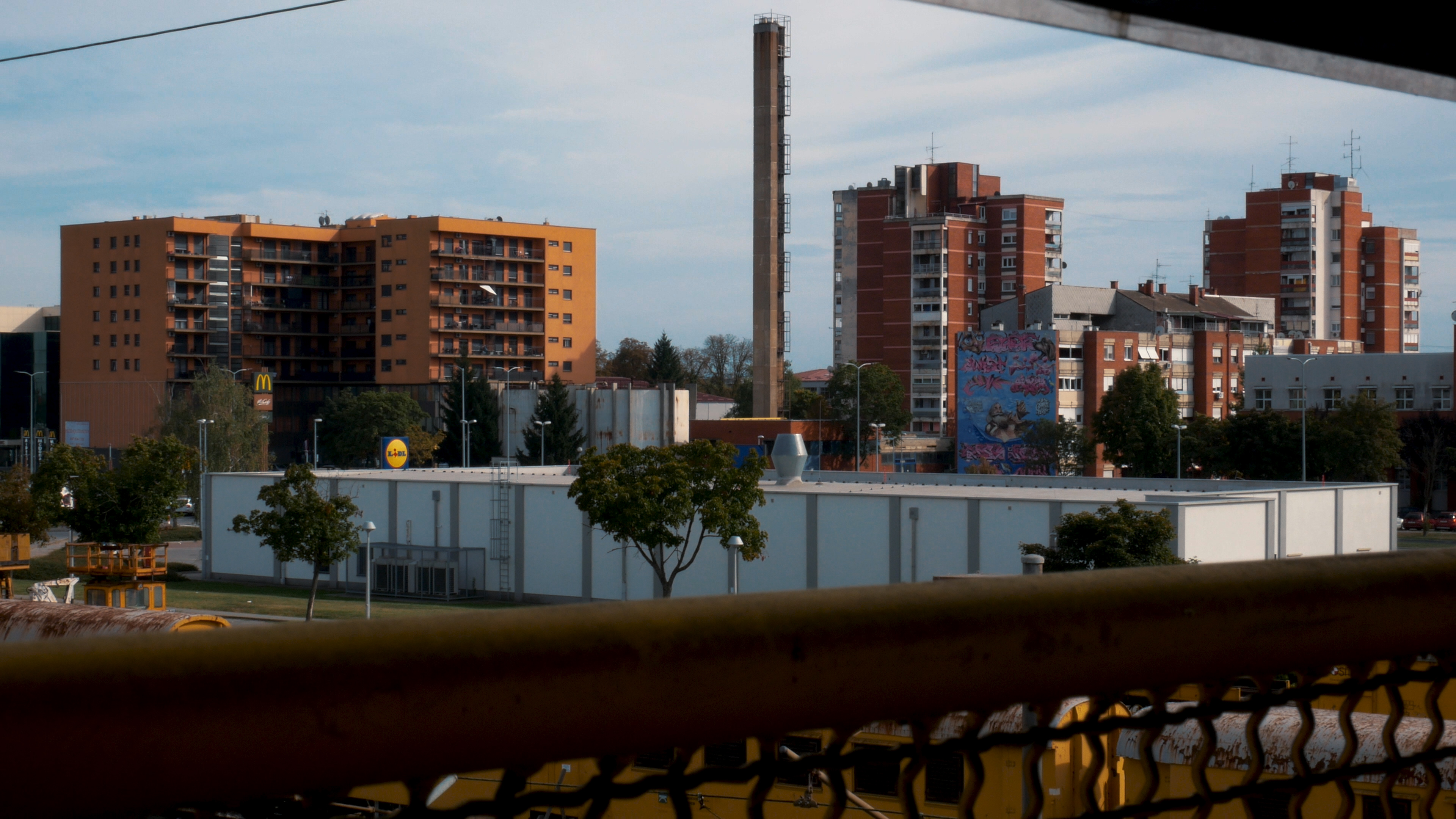 Neboderi na Slavoniji 2